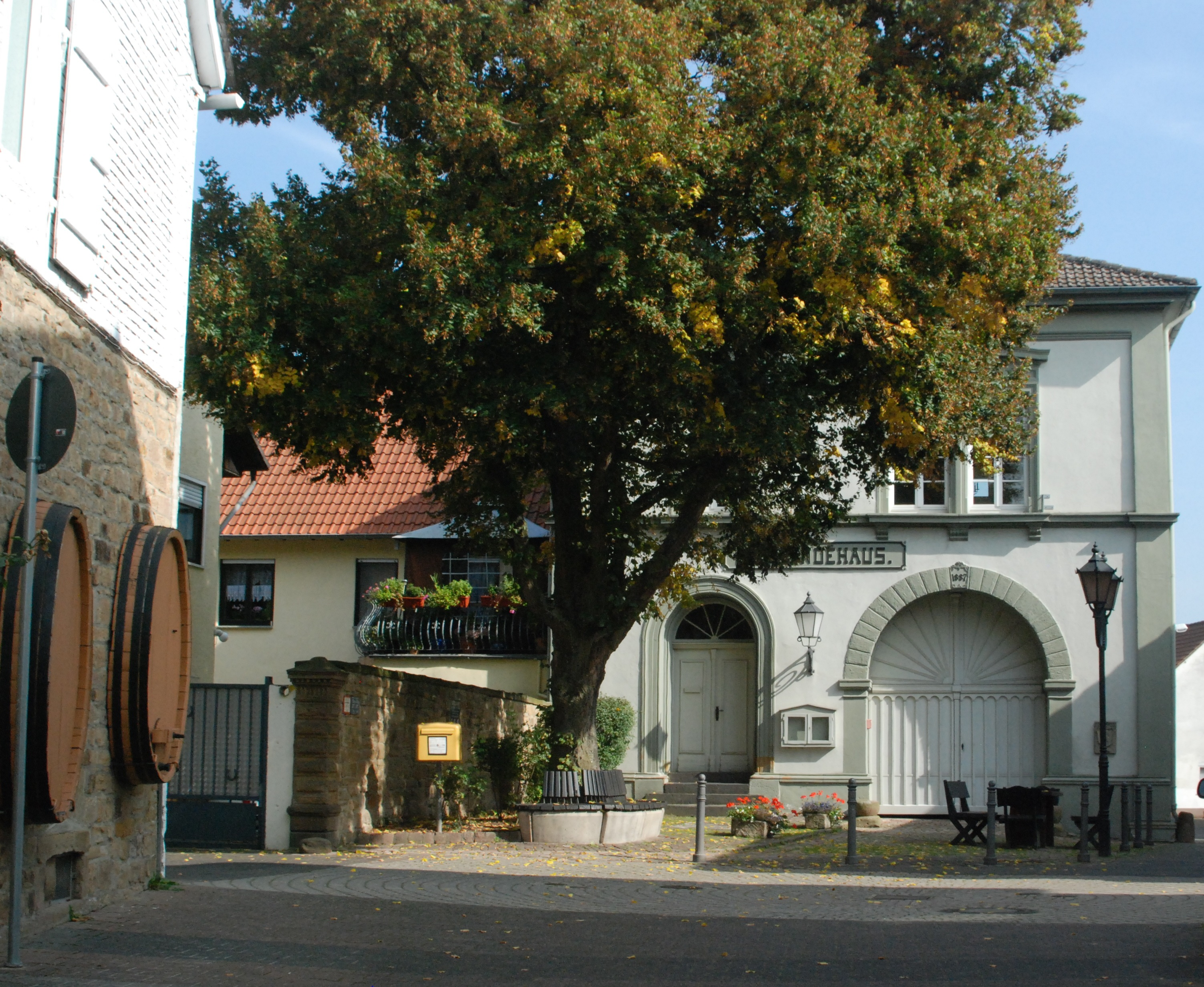 Stein-Bockenheim, Bachgasse 15, Rathaus (Gemeindehaus). spätklassizistischer Walmdachbau, 1887